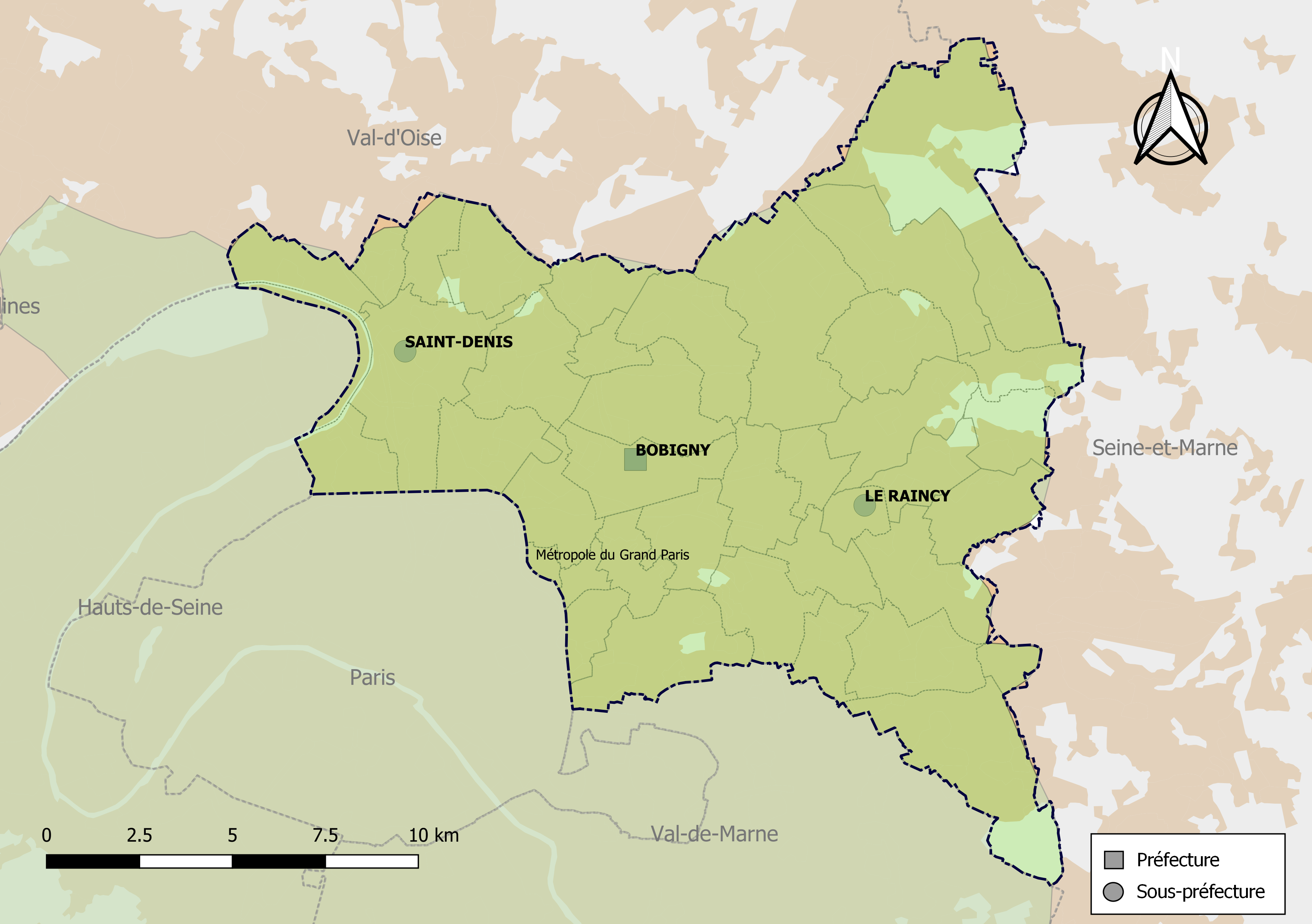 Carte des intercommunalités du département de la Seine-Saint-Denis, France. Composition au 1er janvier 2019.